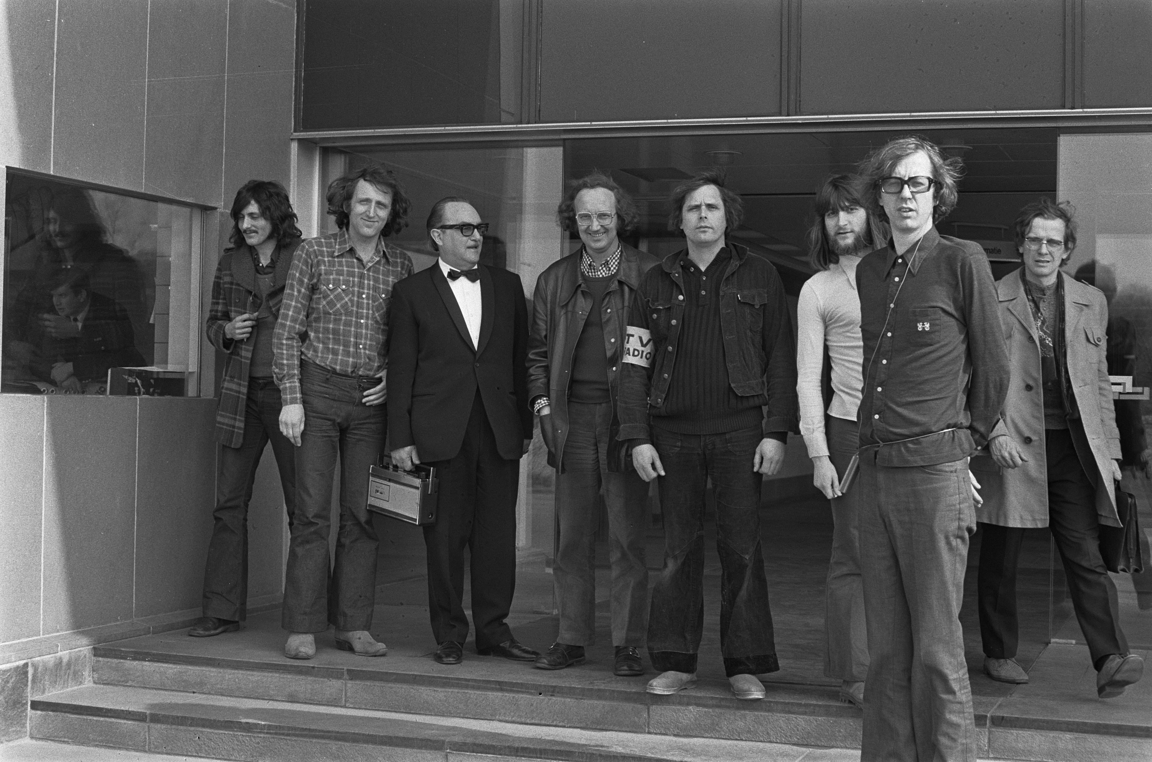 Collectie / Archief : Fotocollectie Anefo Reportage / Serie : [ onbekend ] Beschrijving : Medewerkers van het televisieprogramma "Barend Is Weer Bezig!" in 1973: Wim van der Linden, Dolf Brouwers (Sjef van Oekel), IJf Blokker (Barend Servet), Ruud van Hemert, Wim T. Schippers en Gied Jaspars. Datum : 14 maart 1973 Trefwoorden : groepsportretten, programma's, televisie Persoonsnaam : Blokker, IJf, Brouwers, Dolf, Oekel, Sjef van, Servet, Barend Fotograaf : Peters, Hans / Anefo Auteursrechthebbende : Nationaal Archief Materiaalsoort : Negatief (zwart/wit) Nummer archiefinventaris : bekijk toegang 2.24.01.05 Bestanddeelnummer : 926-2792